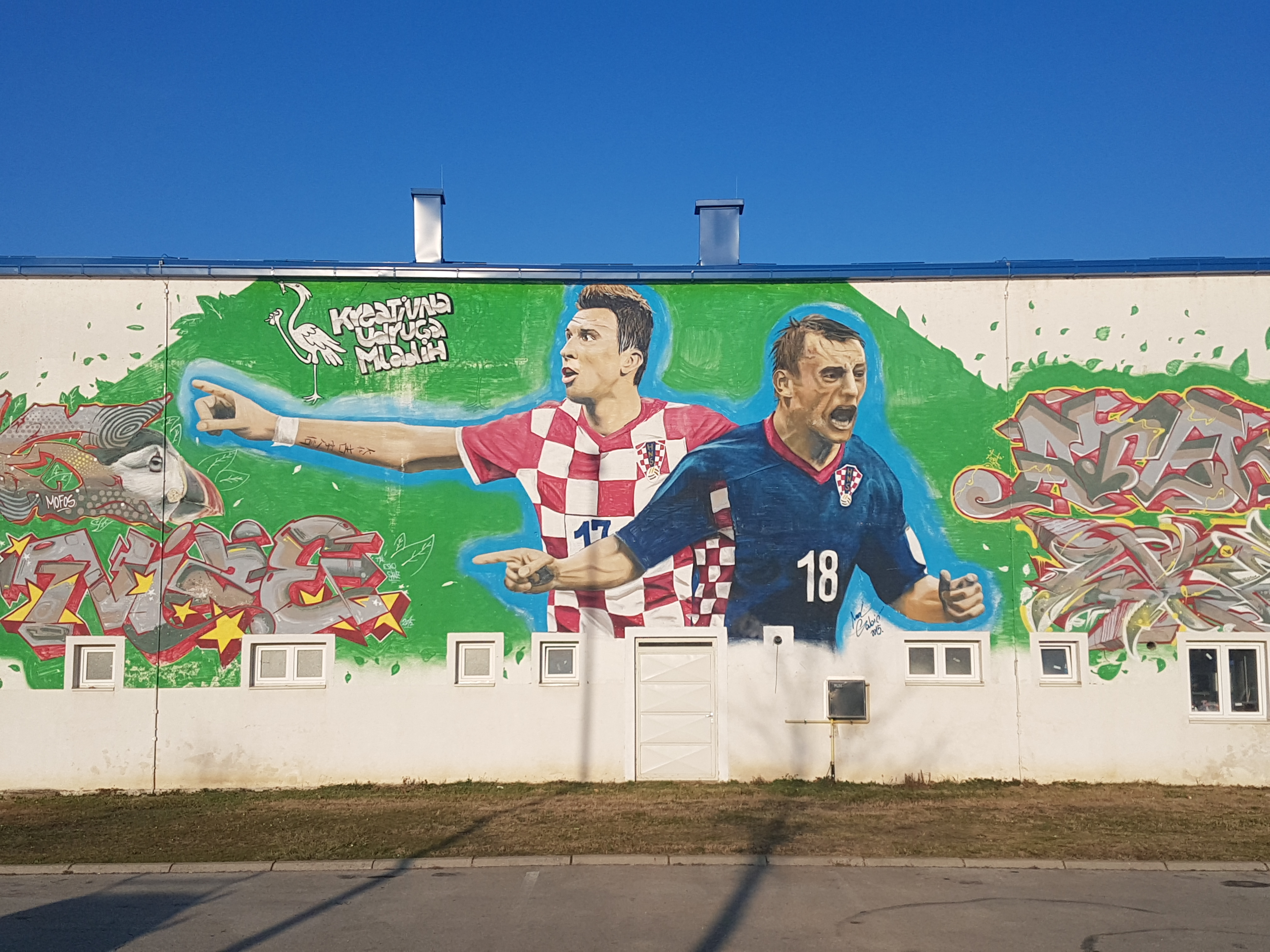 Mural posvećen Mariu Mandžukiću i Ivici Oliću u Slavonskom Brodu